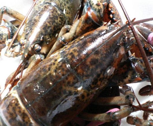 Lobsters for dinner